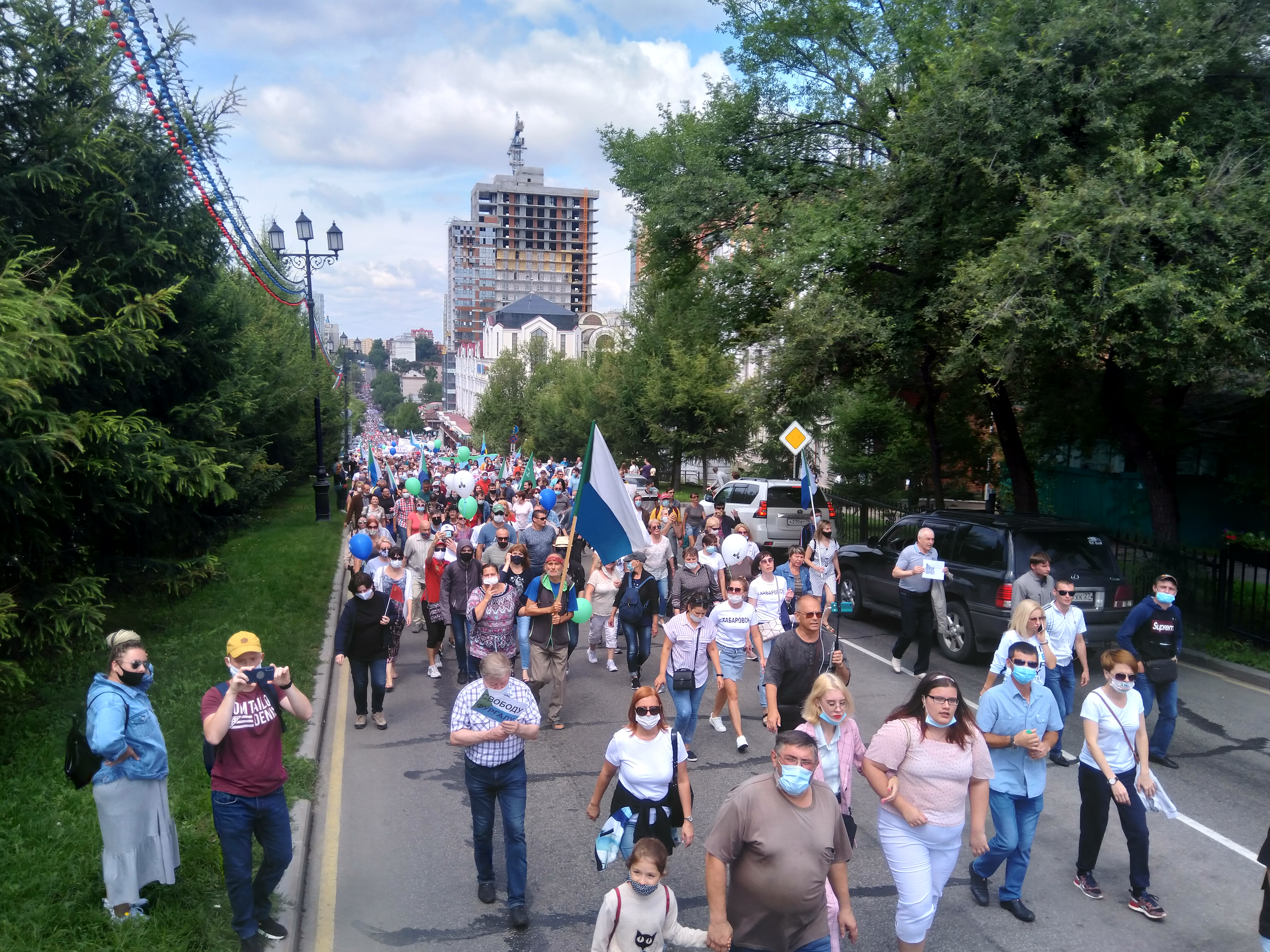 Митинг в Хабаровске 8 августа 2020. Подъём по улице Тургенева к площади Славы